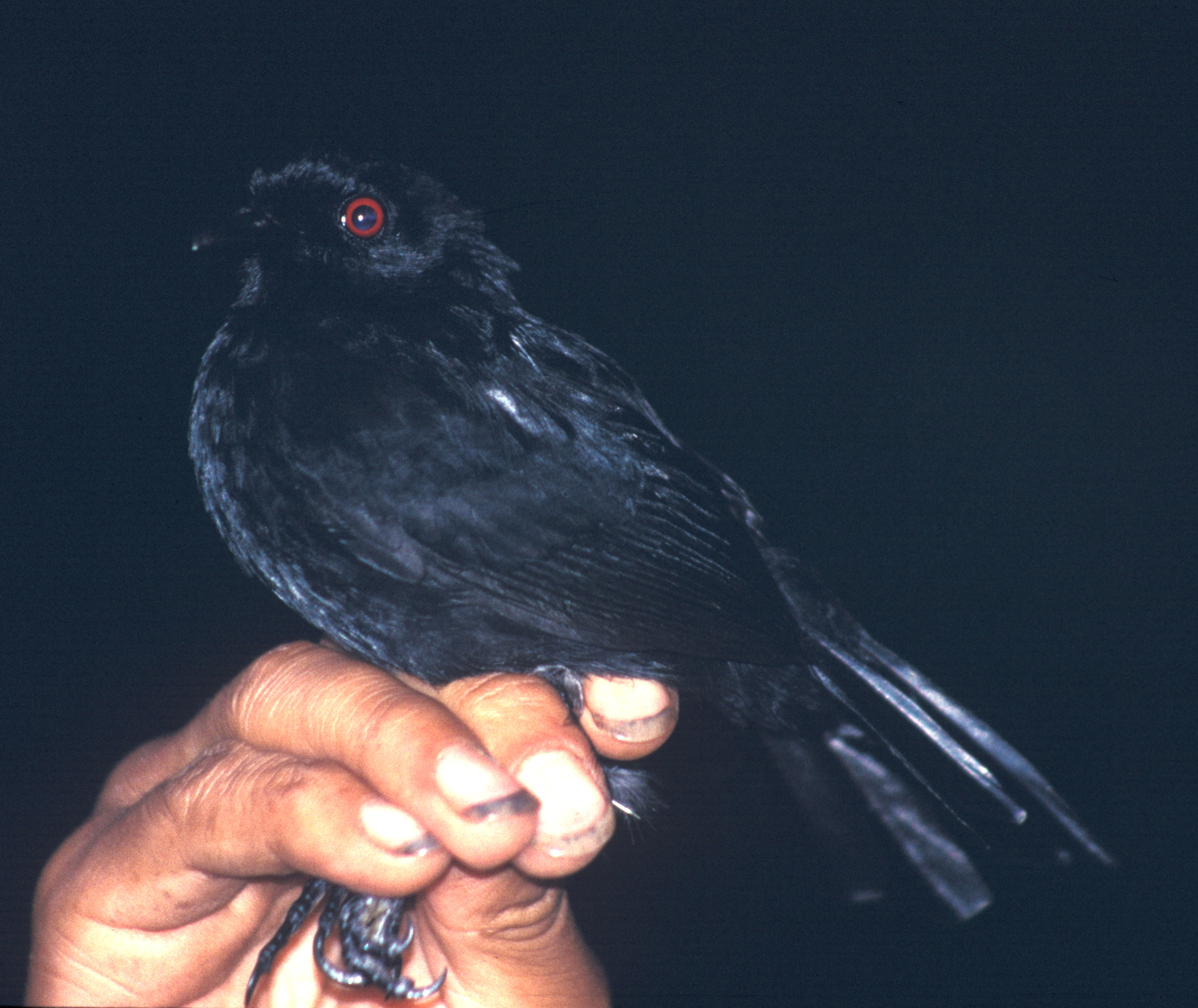 White-backed Fire-eye (Pyriglena leuconota castanoptera). Male from Cordillera del Cóndor, Ecuador.